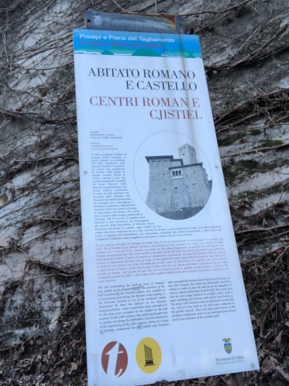 Segnaletica Castelli di Artegna